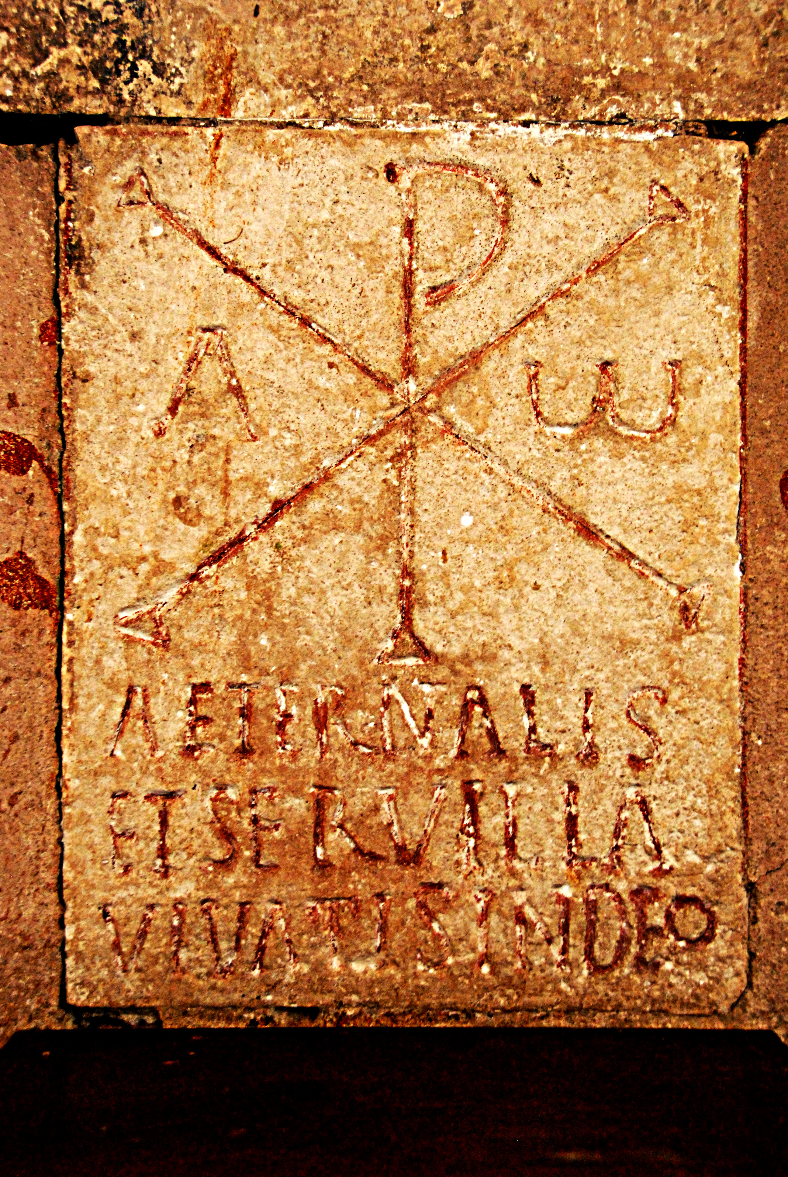 Civaux, Kirche, Chor, eingemauerte Stele